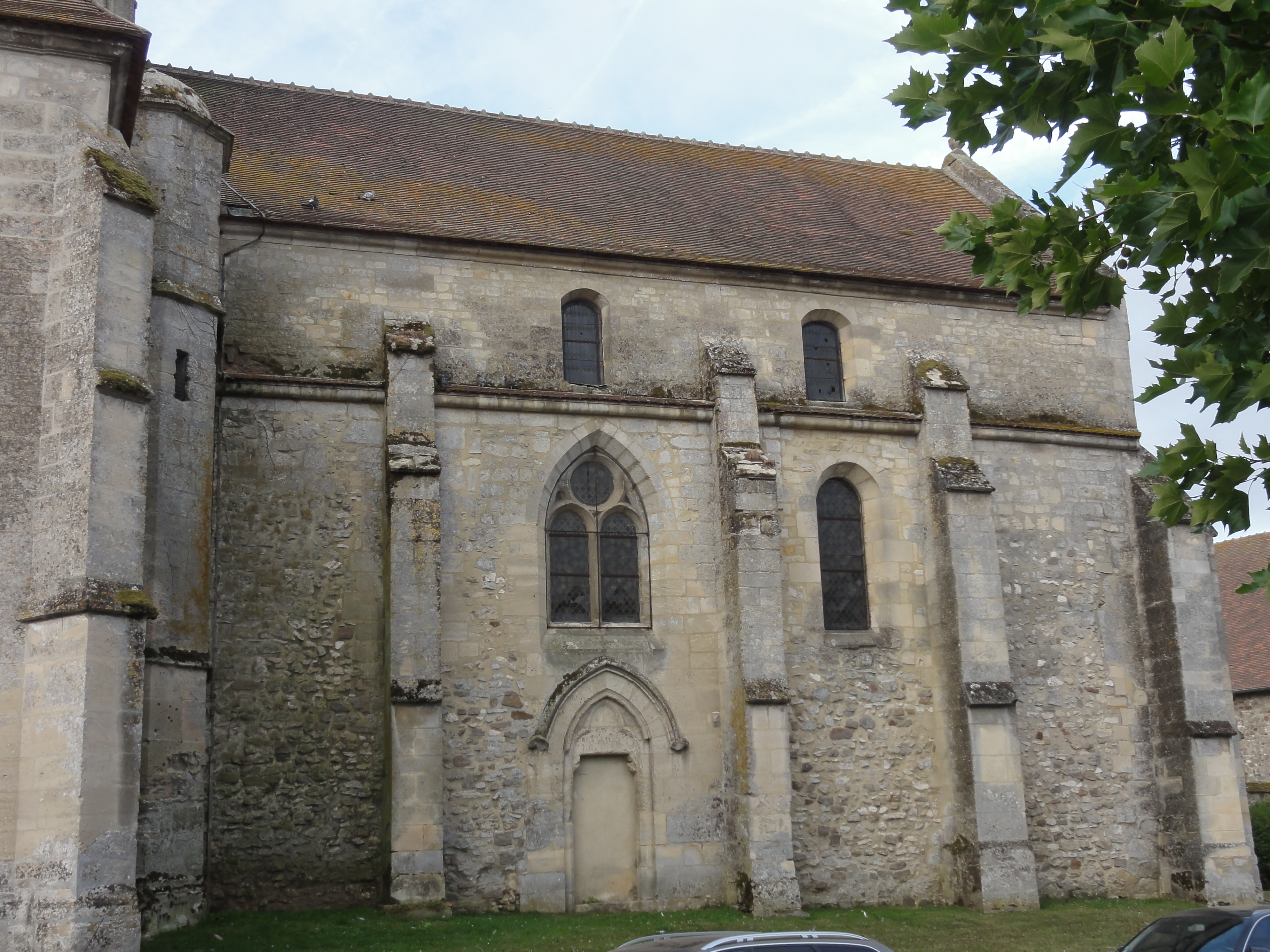 Église Sainte-Marie-Madeleine du Bellay-en-Vexin (voir titre).